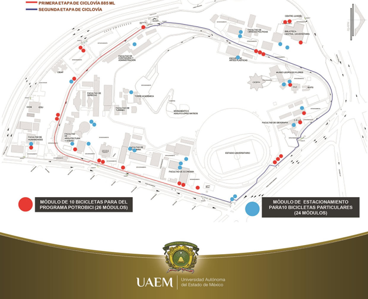 Ciclo Vía